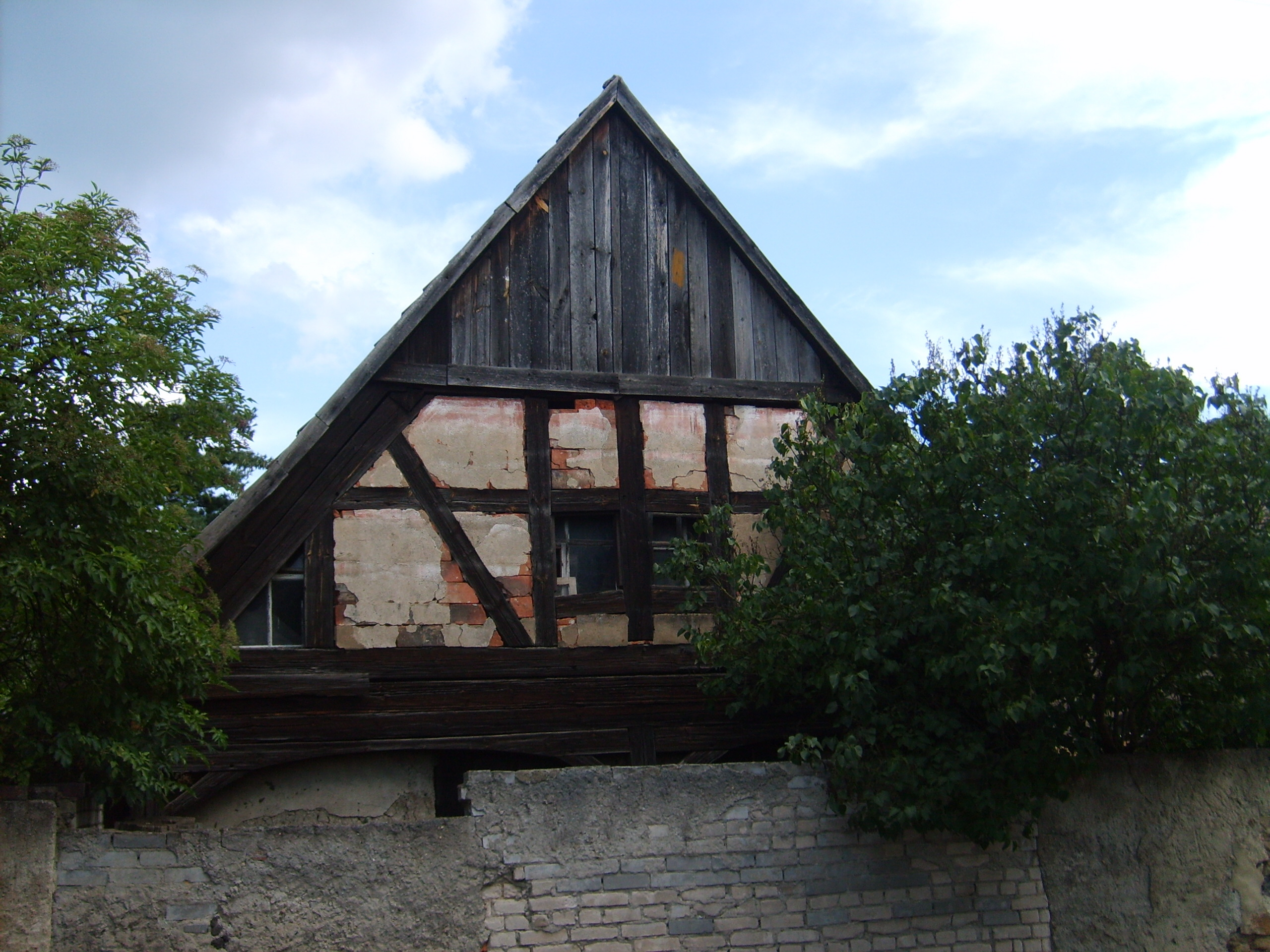 Fachwerkhaus in Würdenhain